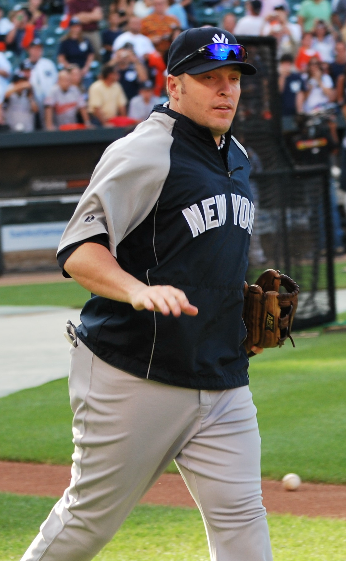 Eric Hinske